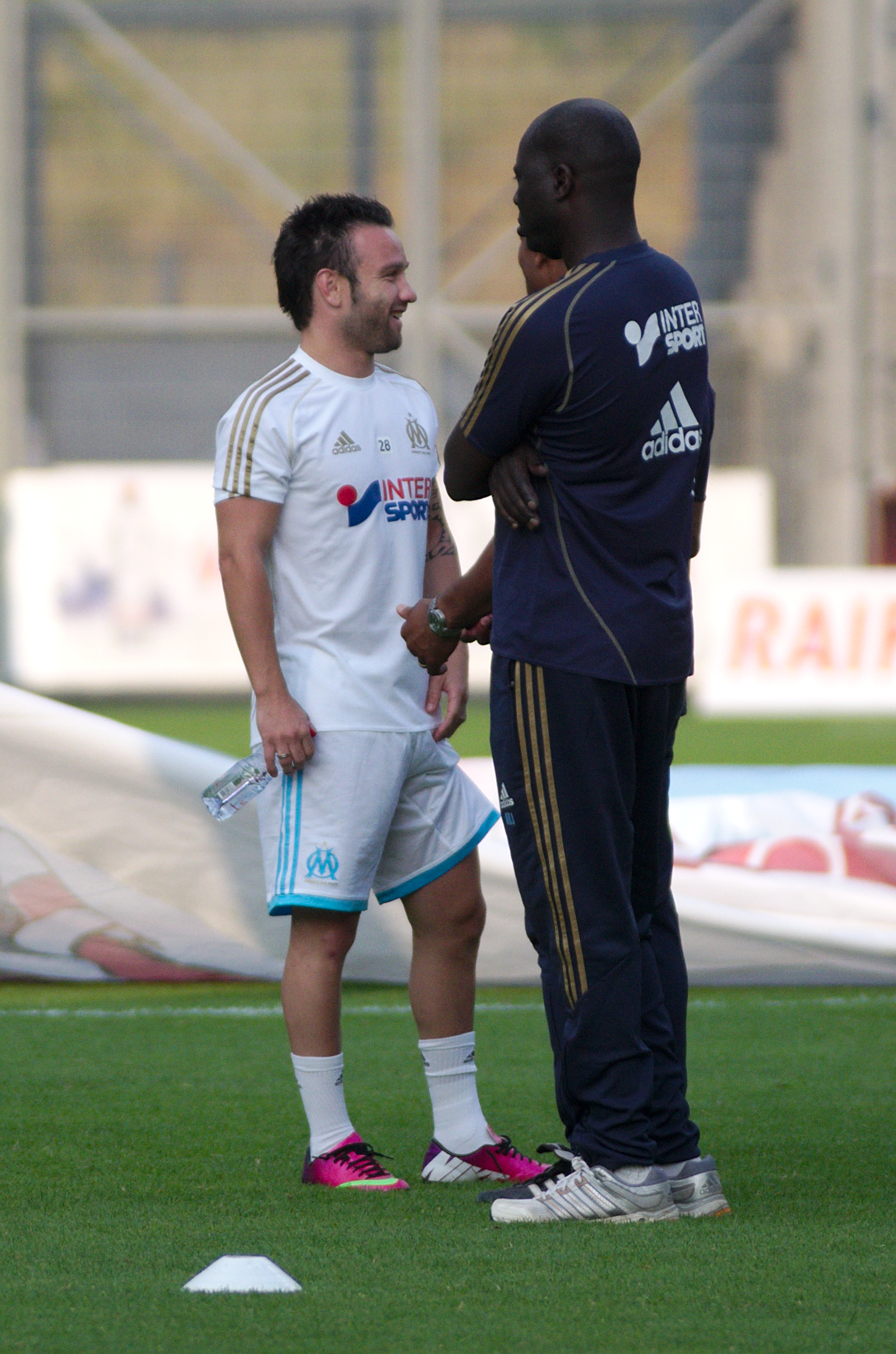 Valais Cup 2013 - OM-FC Porto - 20130713 - Mathieu Valbuena à l'échauffement